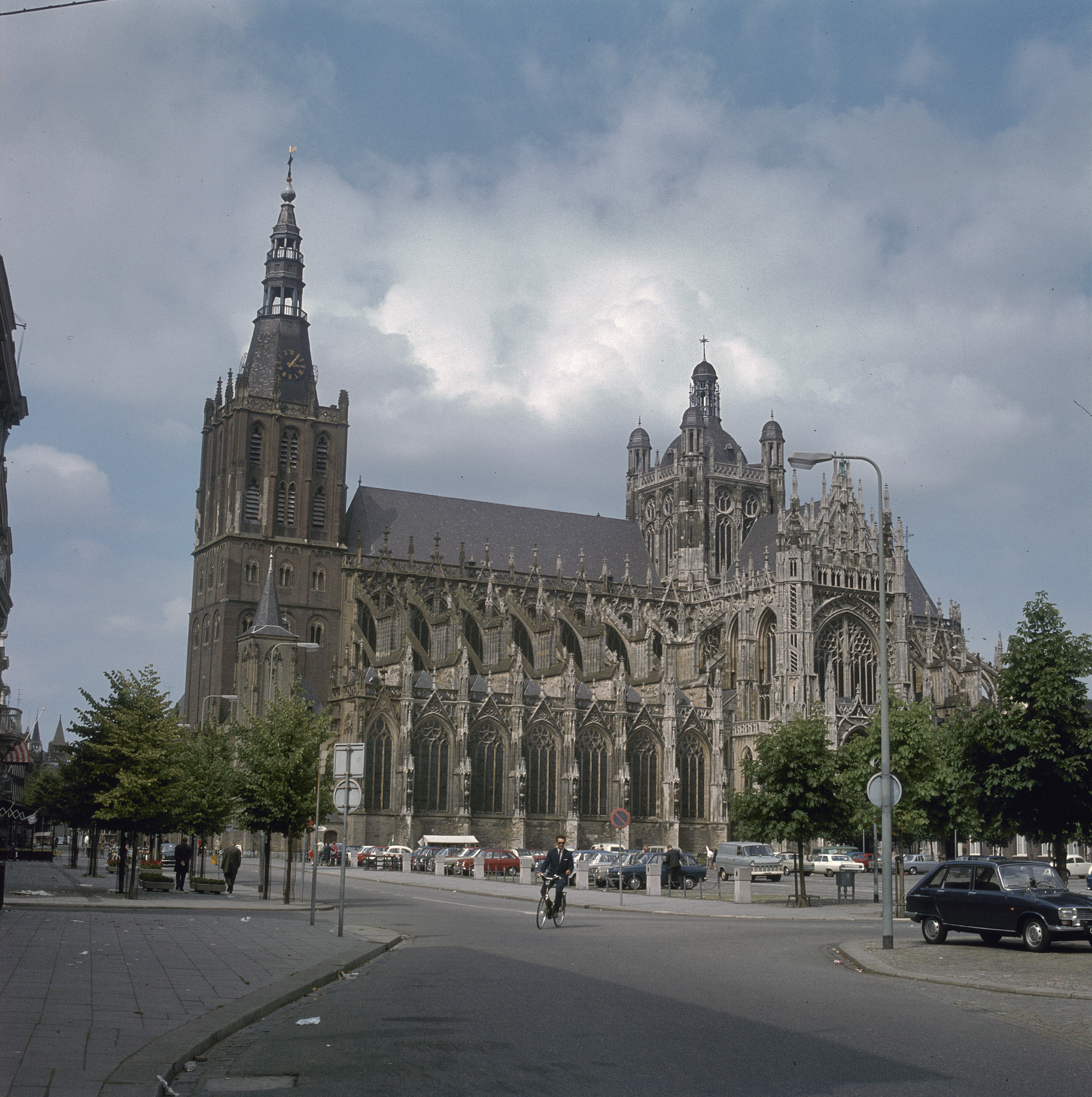 Sint Janskathedraal: Overzicht van de zuidwestgevel met kerktoren (View from the southwest)